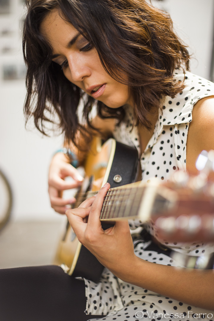 karin zielinski utiliza mucho la guitarra para sus producciones